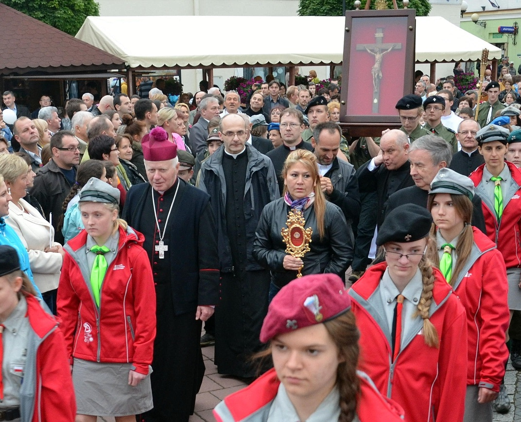 Floribeth Mora Diaz et Mgr Adam Szal, lors d'une action de grâce envers Jean-Paul II, à Sanok, le 1er juin 2014.